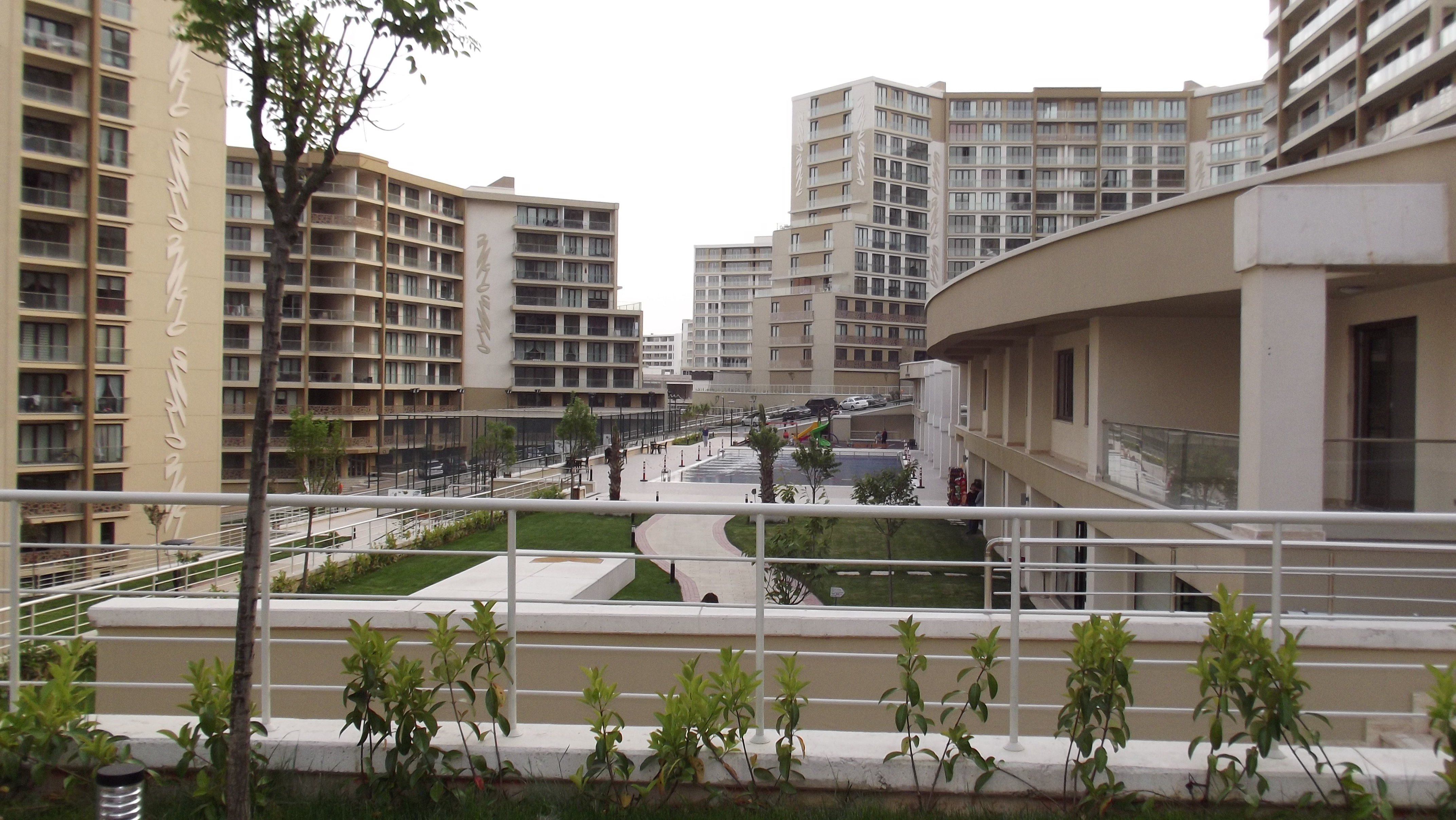 Turyap Vizyon EVora Temsilciliği Nagihan Özcan 0 532 0 692 592.